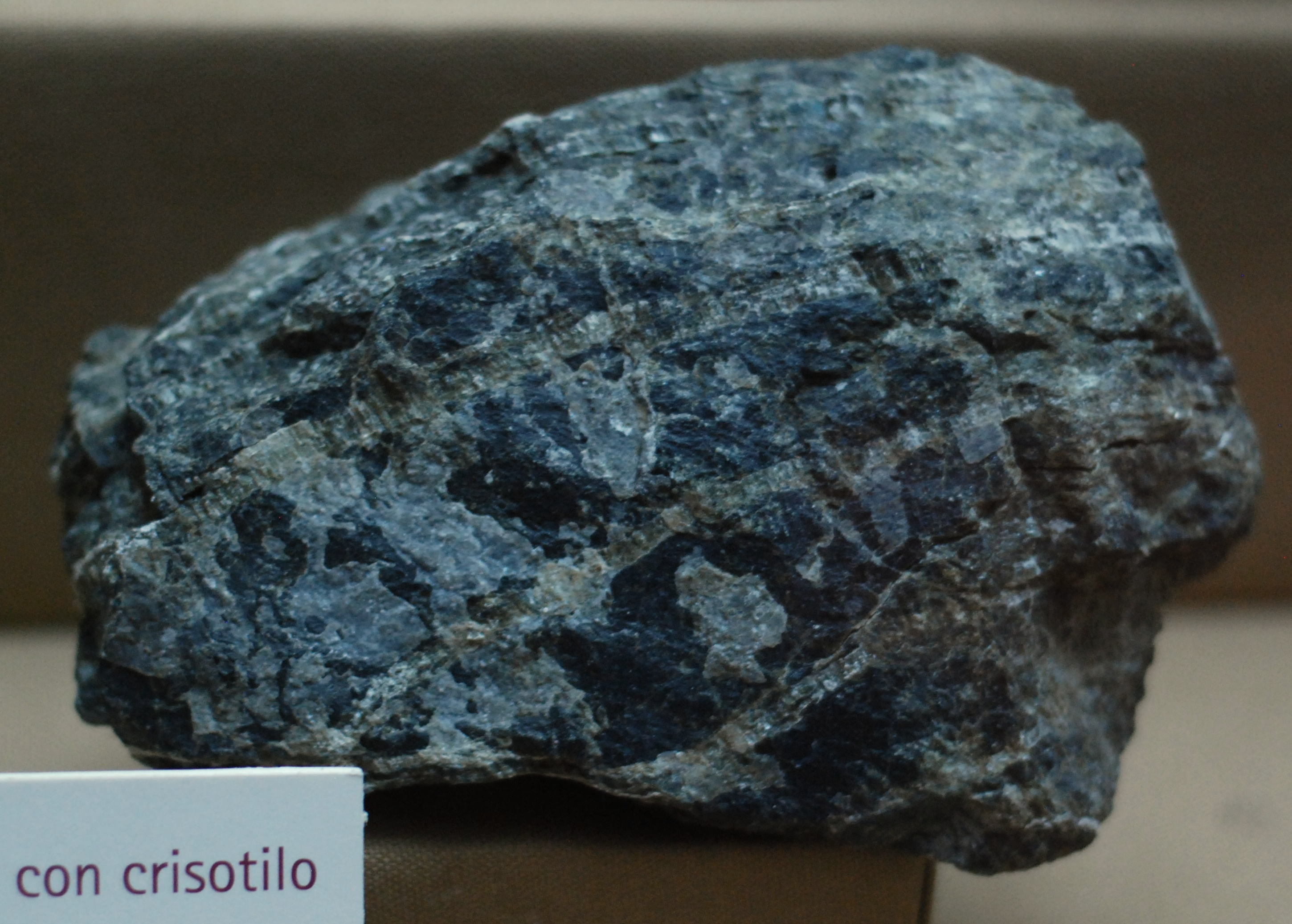 Peridotita con crisotilo. Roca ígnea plutónica. El color oscuro señala falta de cuarzo. La Rioja, Argentina.